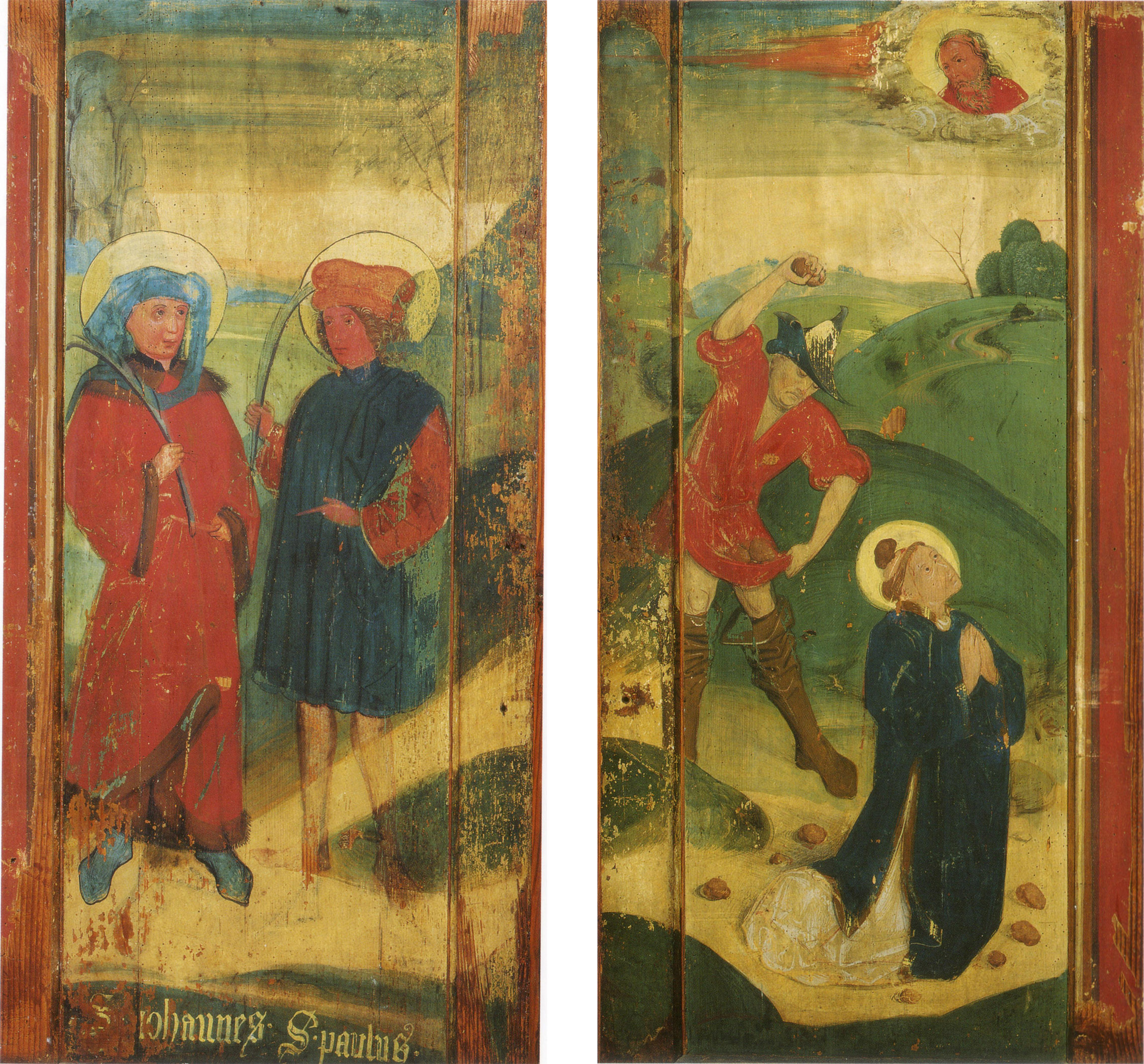 Linke und rechte Rückseite des Altarbildes der Marienkirche in Leipzig-Stötteritz.